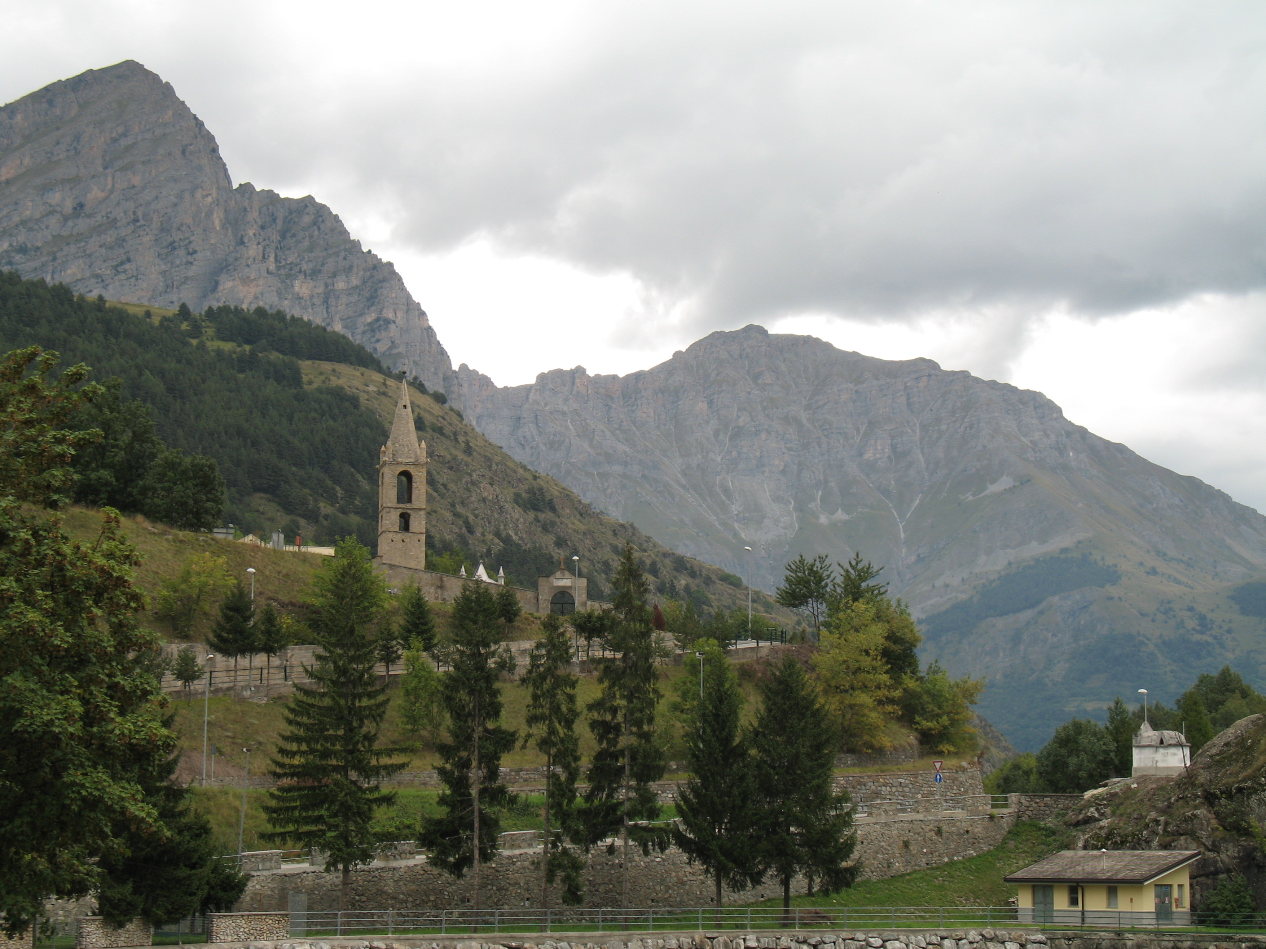 Immagine da Pietraporzio, valle Stura di Demonte, in provincia di Cuneo, Piemonte, Italia